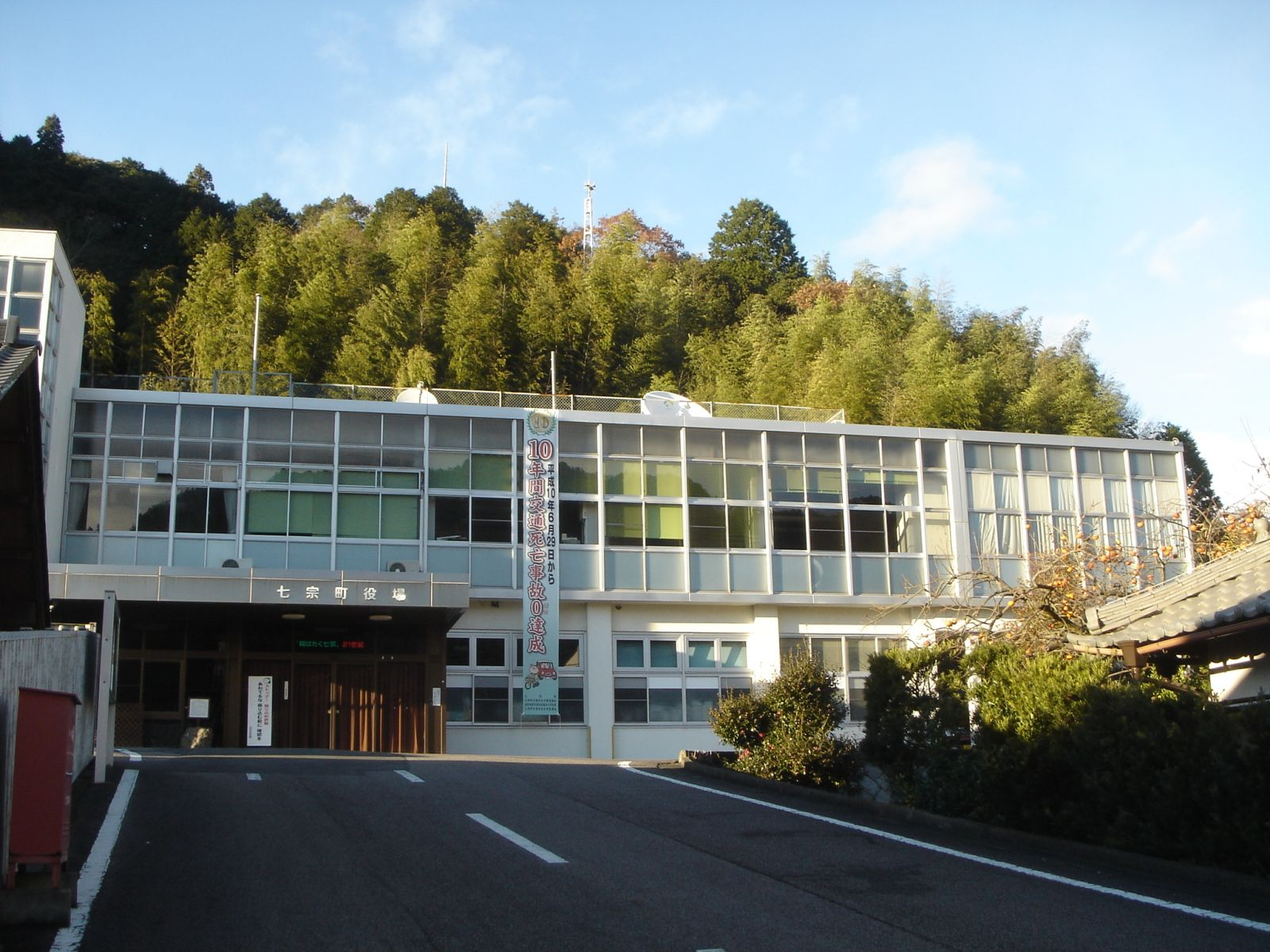 七宗町役場、岐阜県加茂郡七宗町上麻生で撮影